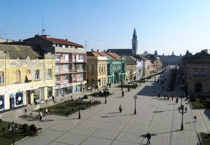 Пешачка улица у Сомбору.